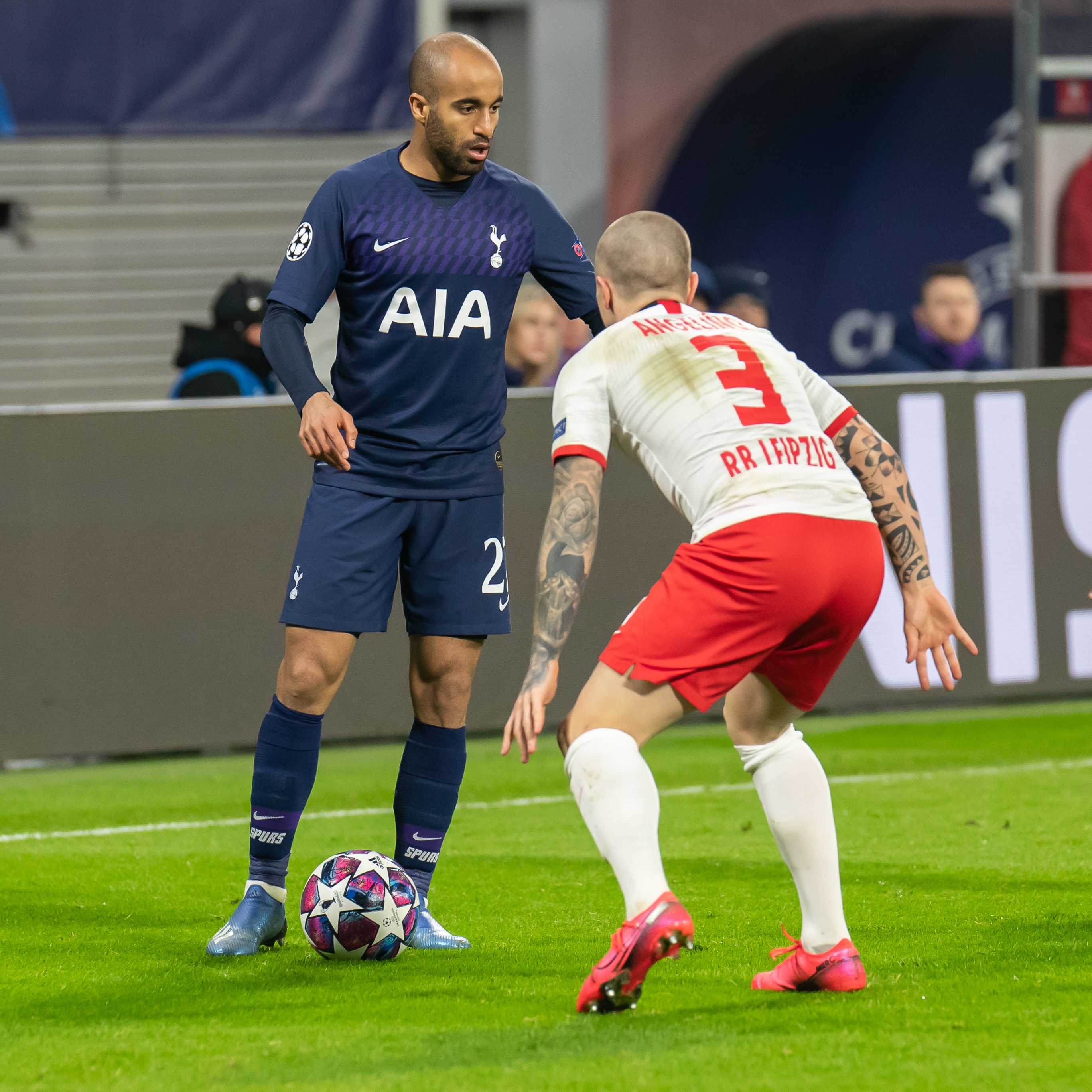 Fußball, Männer, UEFA Champions League Achtelfinale, RB Leipzig - Tottenham Hotspur; v.li.: Lucas Moura (Tottenham Hotspur, 27), Jose Angel "Angelino" Esmoris Tasende (RB Leipzig, 3)